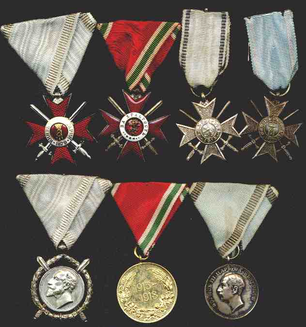 Български ордени за храброст и медали